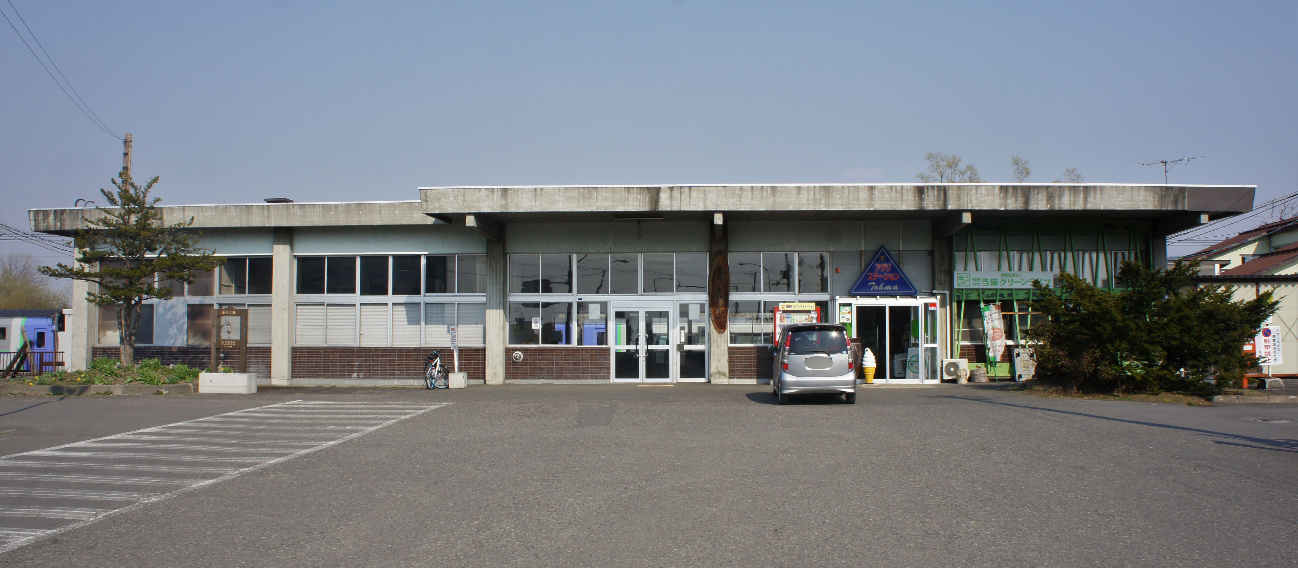 JR石北本線・当麻駅の駅舎